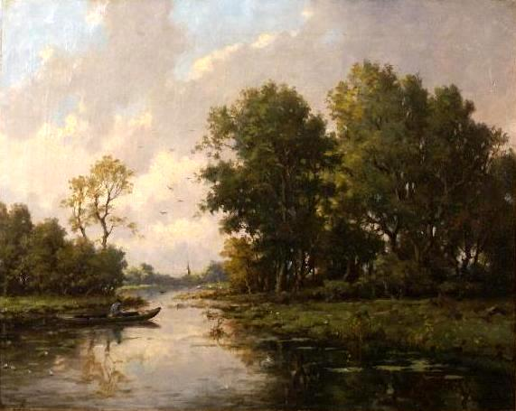 Un paysage a Barbizon